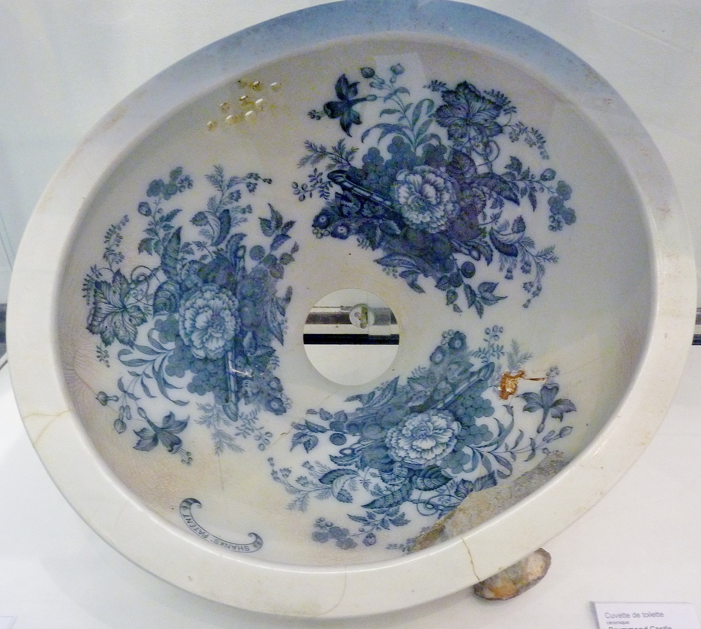 Cuvette de toilette du paquebot Drummond Castle naufragé le 16 juin 1896 près de l'archipel de Molène (Musée maritime du Cap-Sizun, DRASSM, inventeur Jacques Ouchakoff).